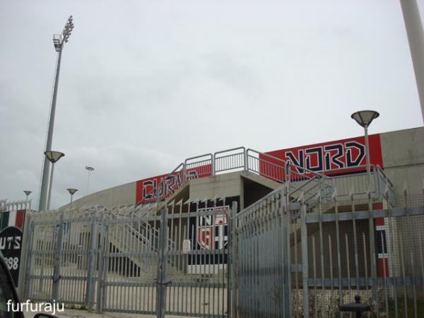 Sassari - Stadio Vanni Sanna